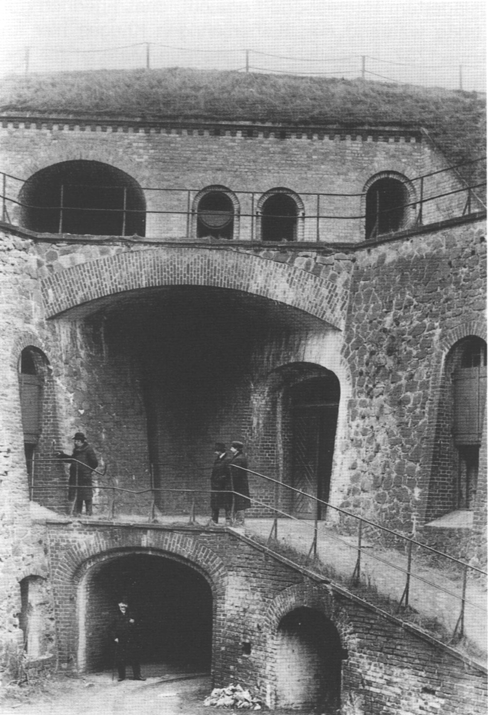 Innenansicht des ehemaligen Fort Berge in Magdeburg, Sachsen-Anhalt, Germany, inneres Befestigungswerk Donjon